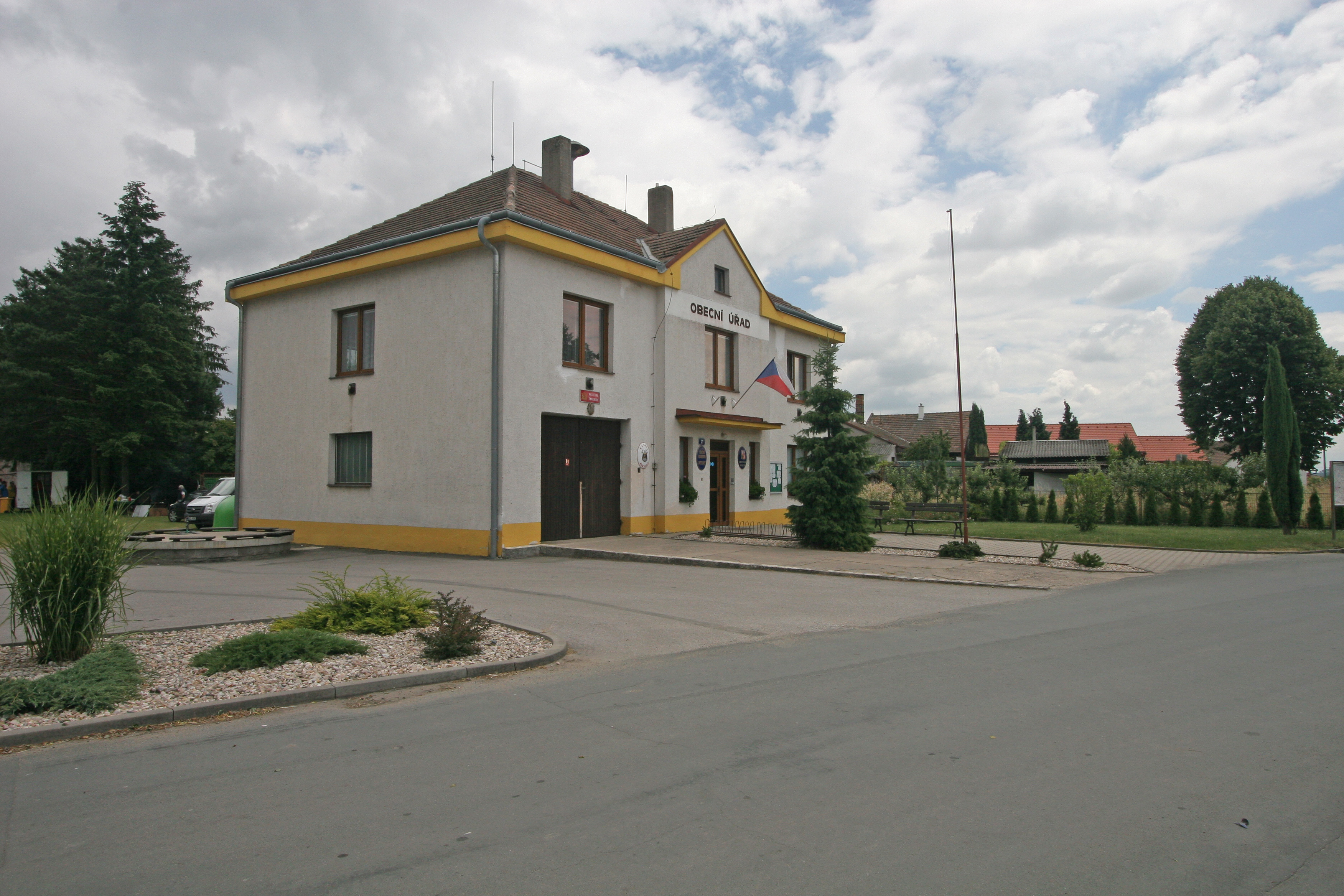 Rokytno obecní úřad